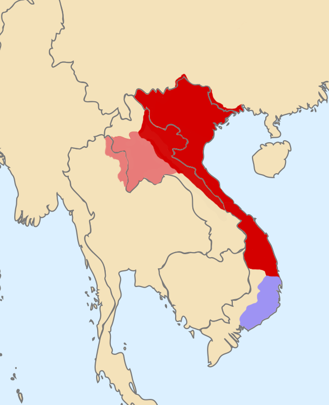 Cương thổ Đại Việt thời Lê Thánh Tông (1460-1497) bao gồm xứ Bồn Man và lãnh thổ mới chiếm được từ Chăm Pa. Màu đỏ nhạt là lãnh thổ chiếm được trong thời gian ngắn trong cuộc chiến tranh Đại Việt - Lan Xang (1478-1480). Màu xanh nhạt là ba vương quốc của người Chăm.